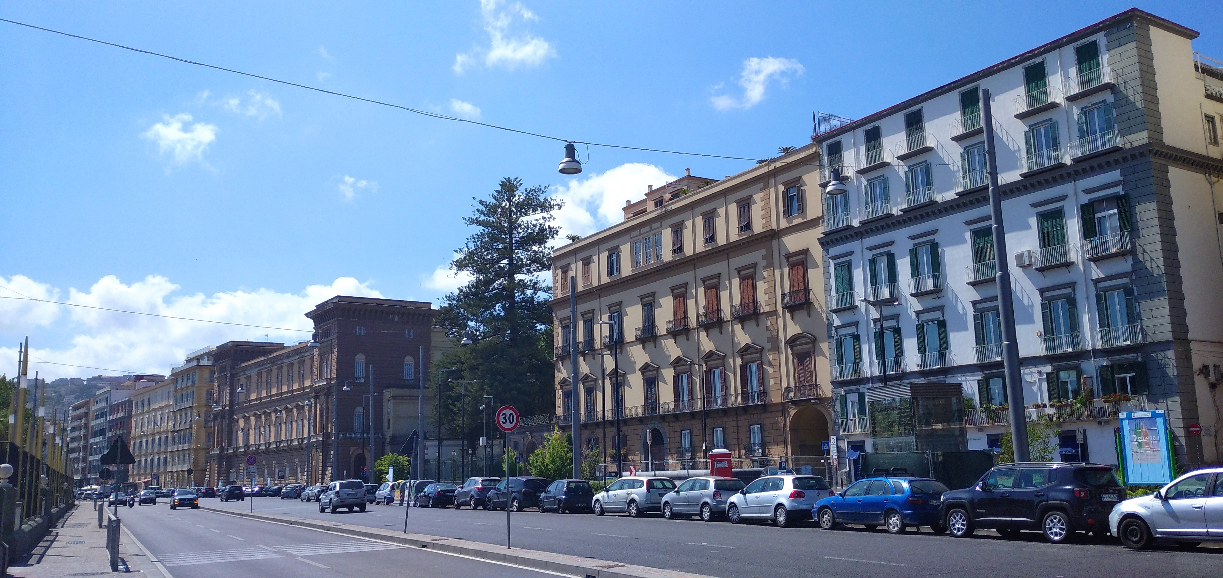 Riviera di Chiaia